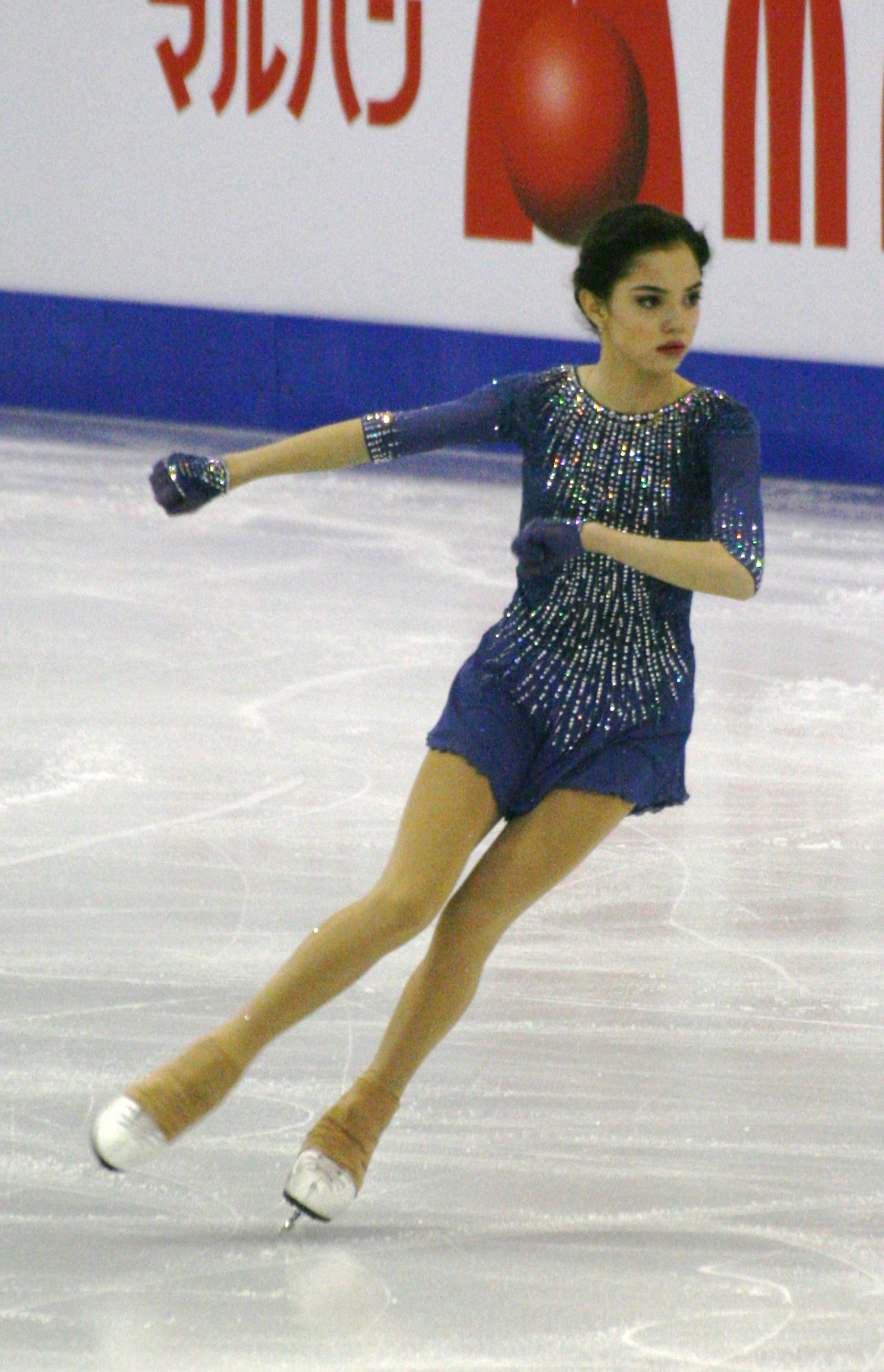 Евгения Медведева (Россия) на финале Гран-при по фигурному катанию 2015-2016.